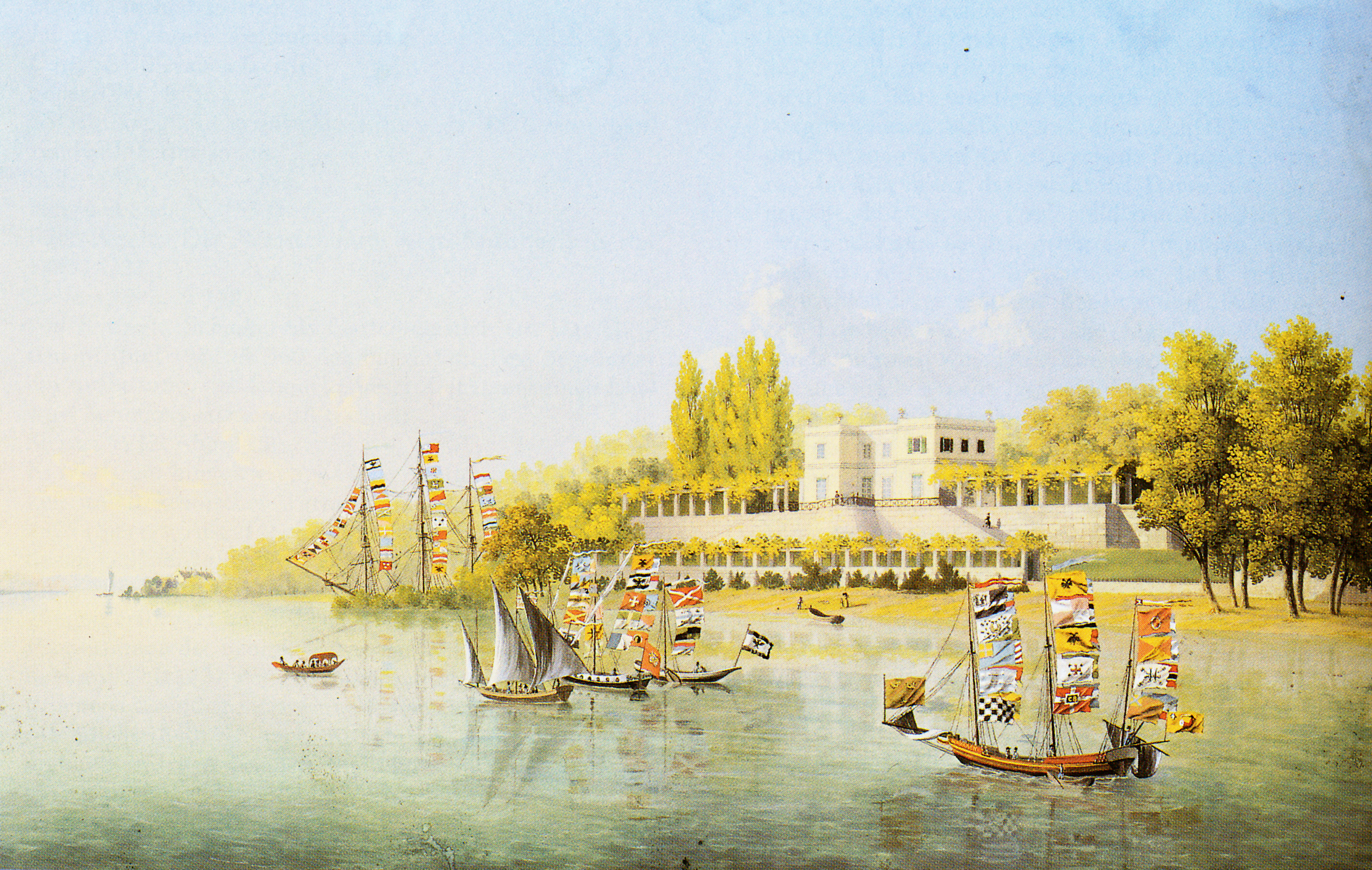 J.H. Bleuler, Casino mit der Flotte des Prinzen Carl in Klein-Glienicke, 1830